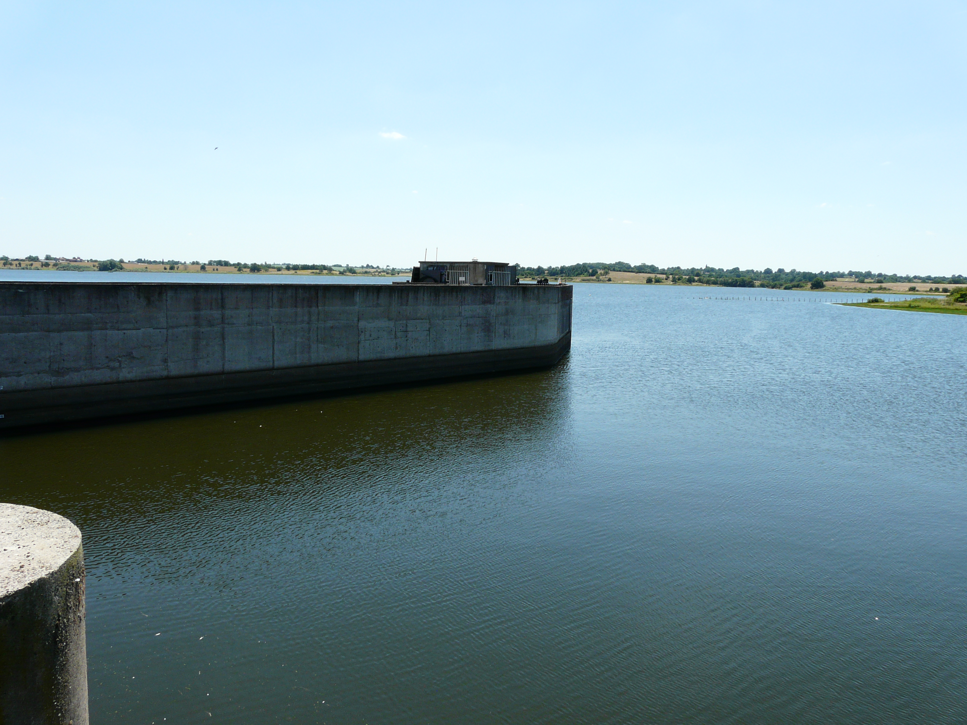 La partie septentrionale du lac du Cébron vue depuis le barrage du Cébron, communes de Louin et Saint-Loup-Lamairé, Deux-Sèvres, France